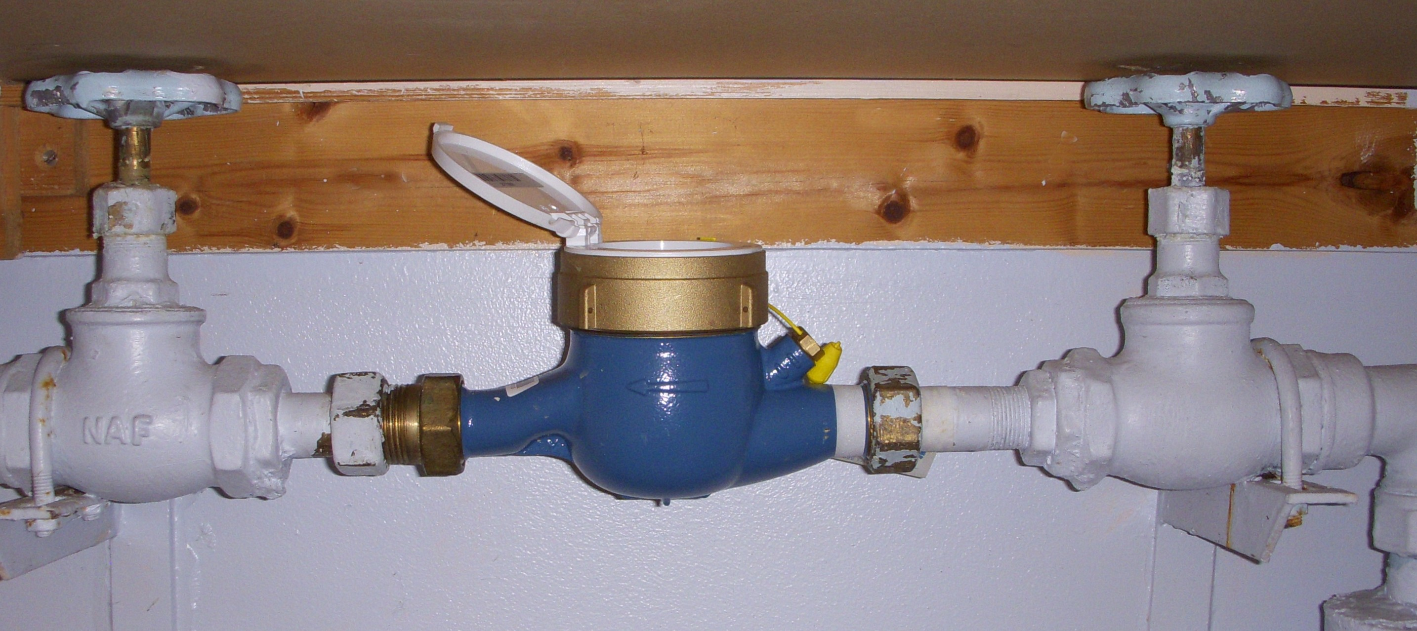 Svensk vattenmätare, sidoansikt